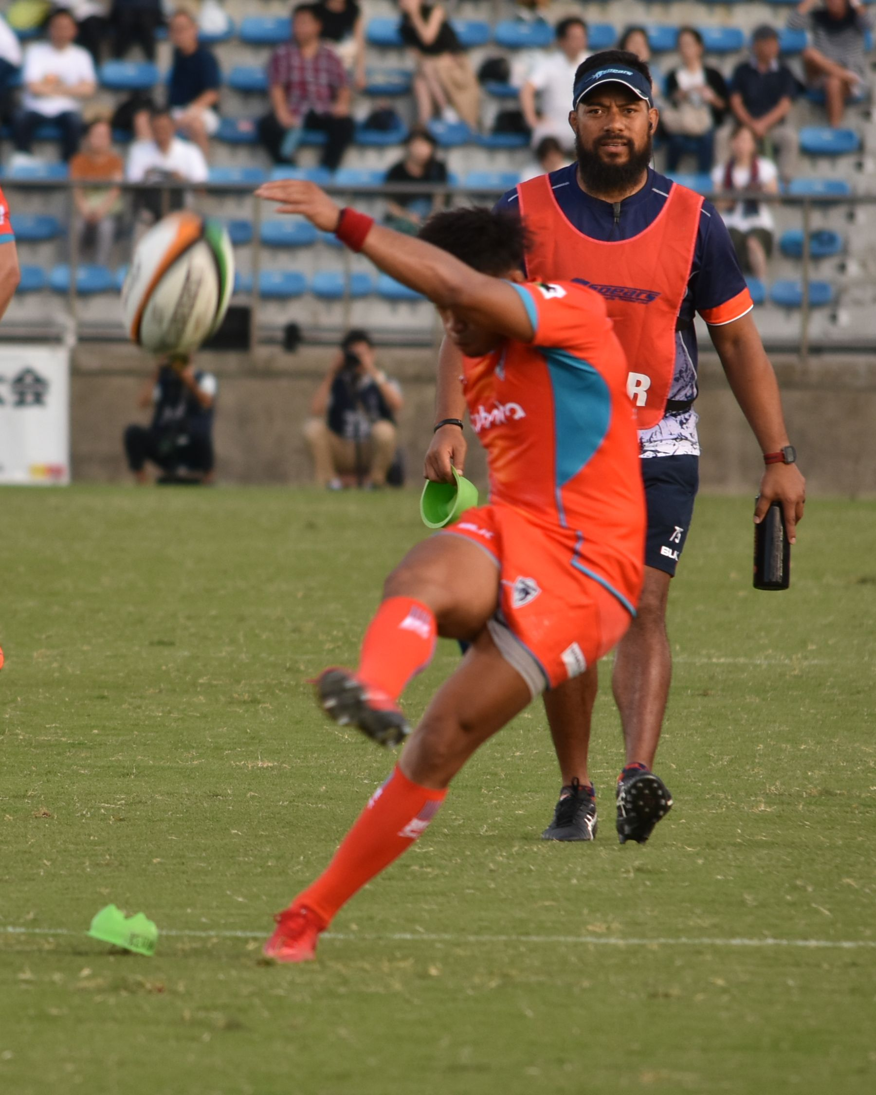 合谷 和弘